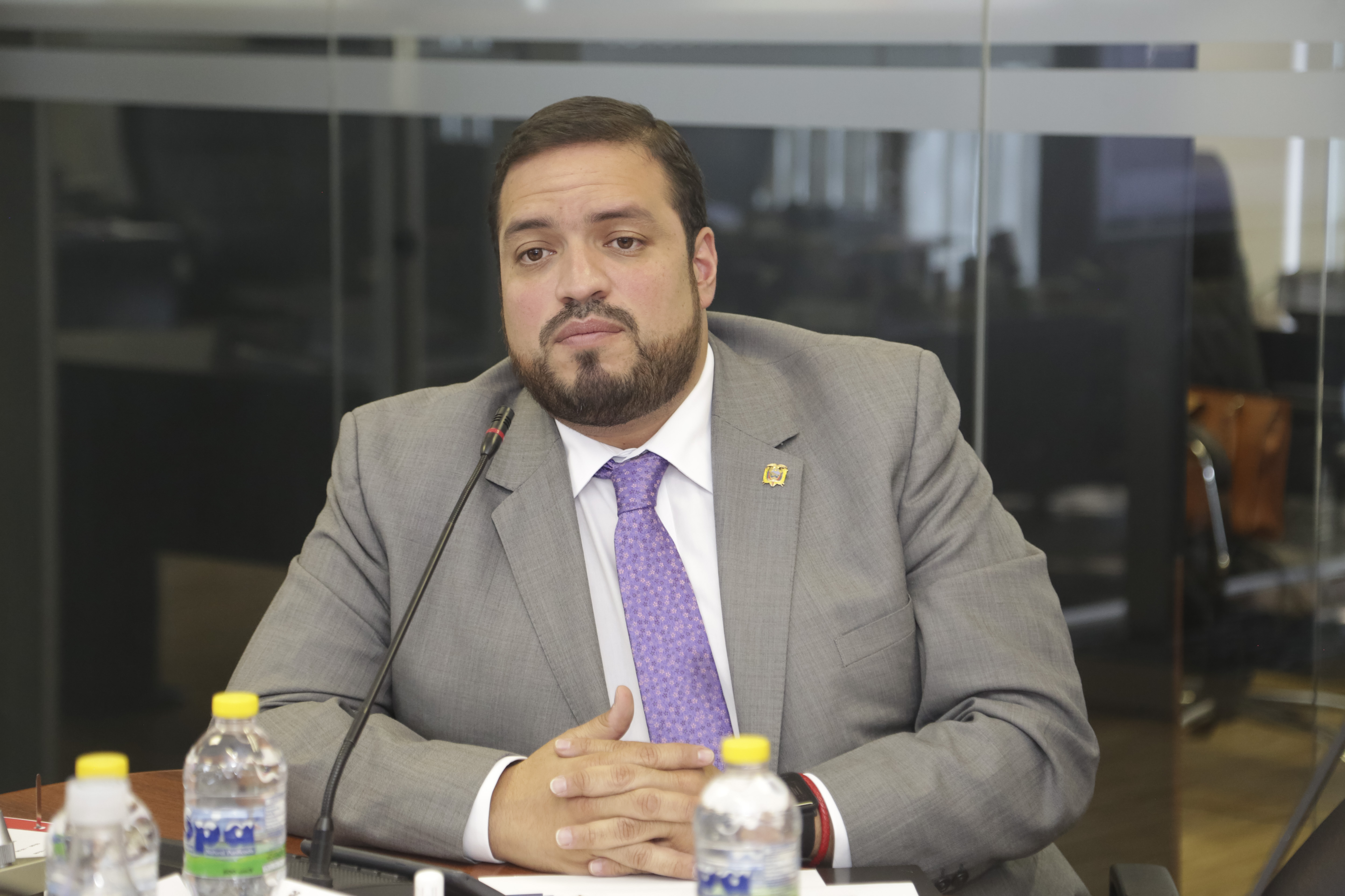 ministro de trabajo de ecuador